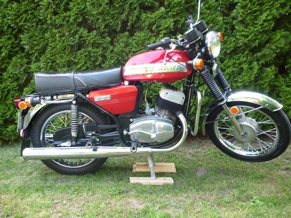 Jawa 350 typ 634-7-02. Motocykl vyráběný v tehdejším Československu, tento konkrétně v roce 1981.